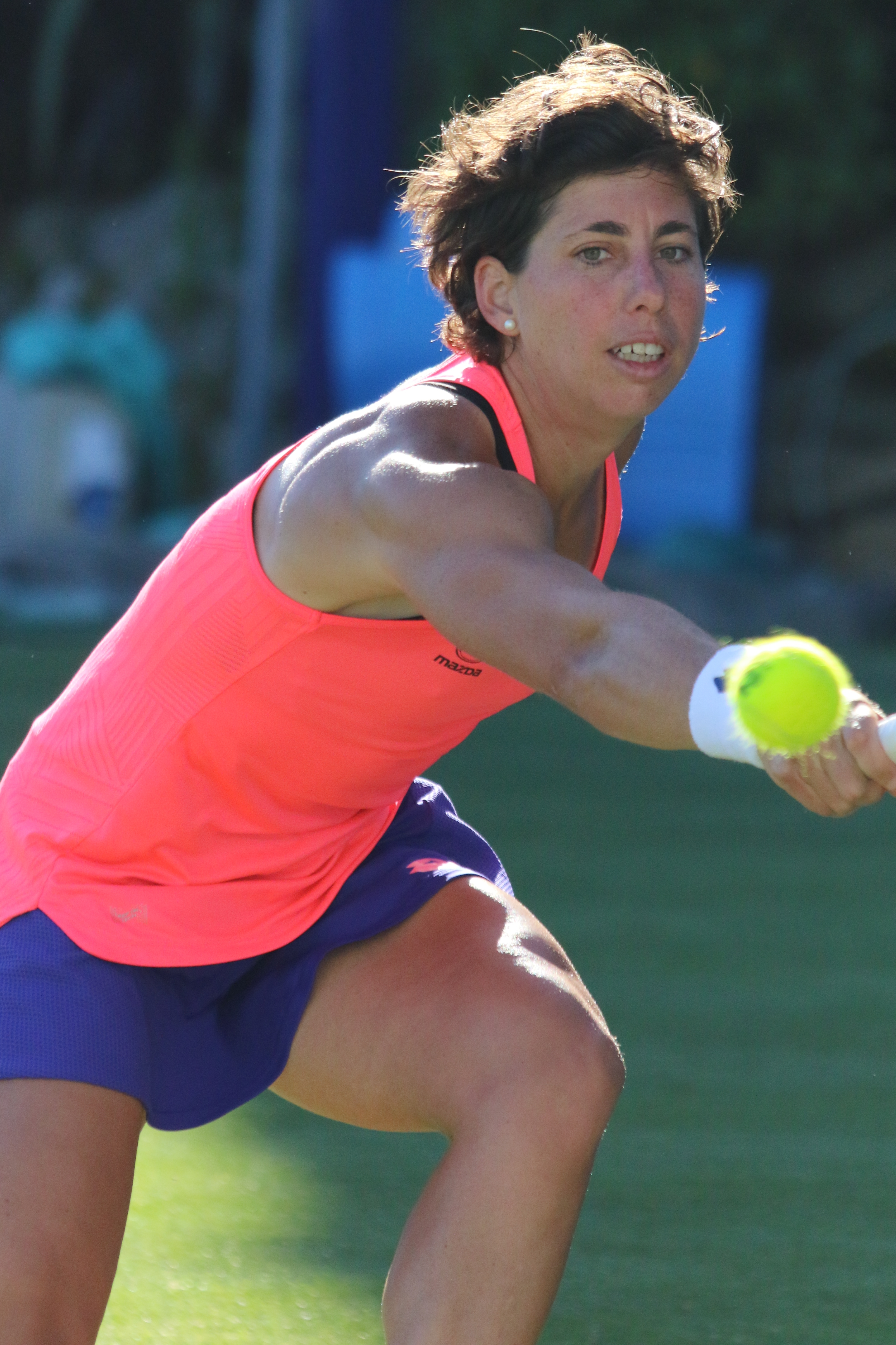 Suarez Navarro EBN17 (28)